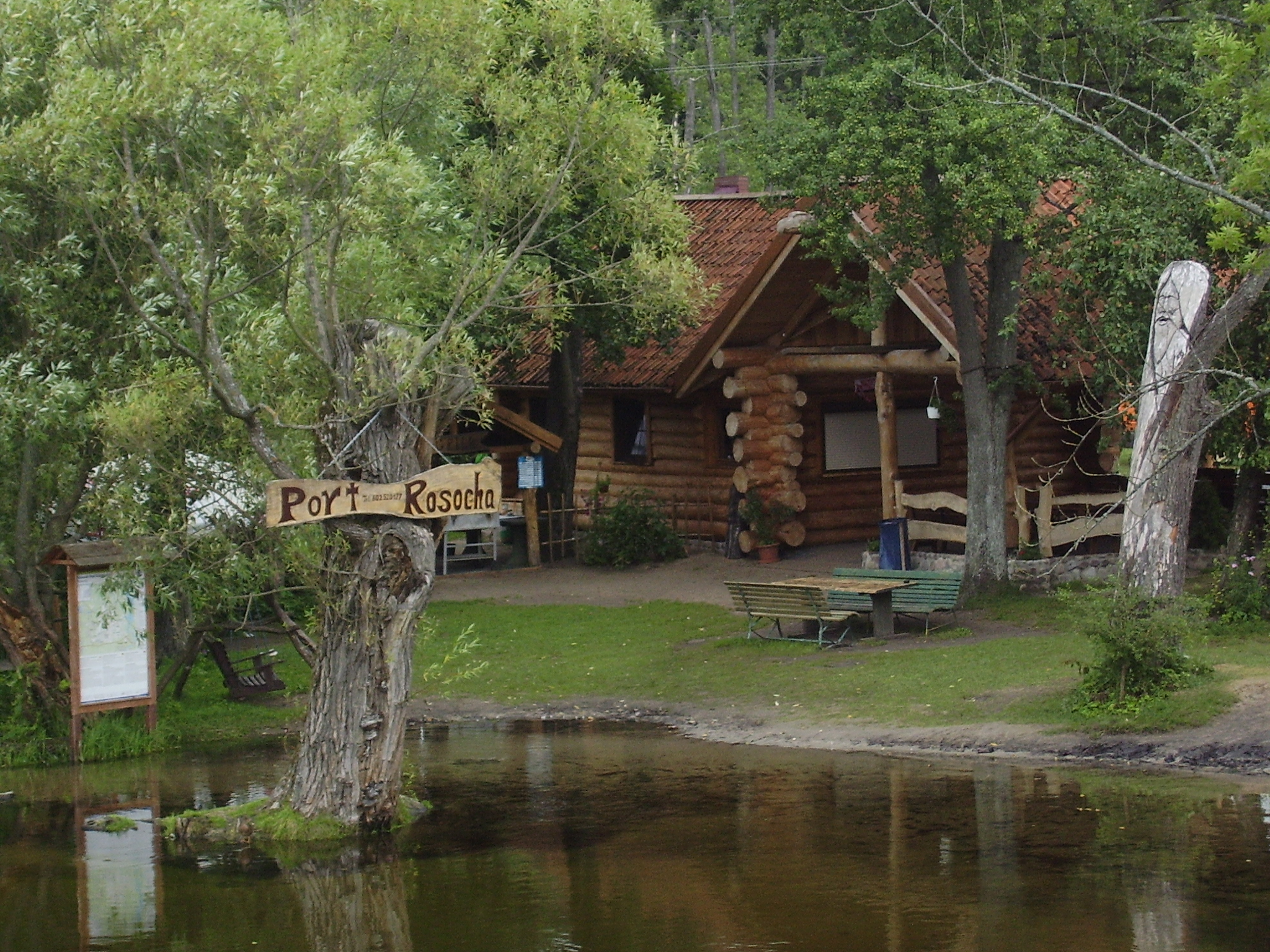 Port Rosocha sierpień 2012